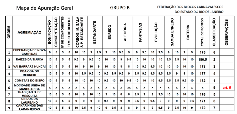 FBCERJ - 2019 - Grupo B